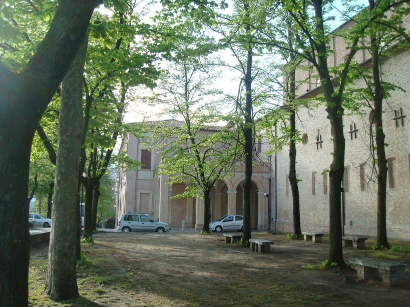 Madonna del Monte di Cesena (Italie), entrée de la basilique.